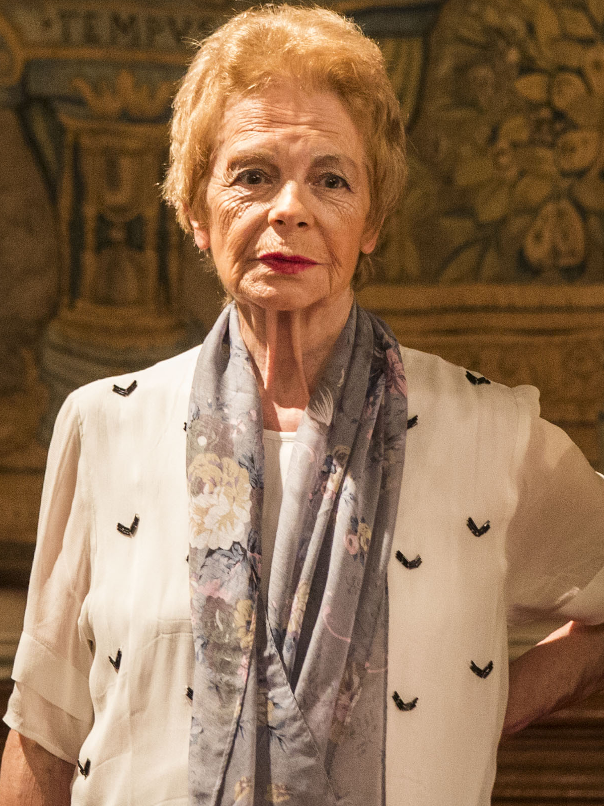 Foto de Hebe Uhart en ocasión de recibir el Premio del Fondo Nacional de las Artes 2015.